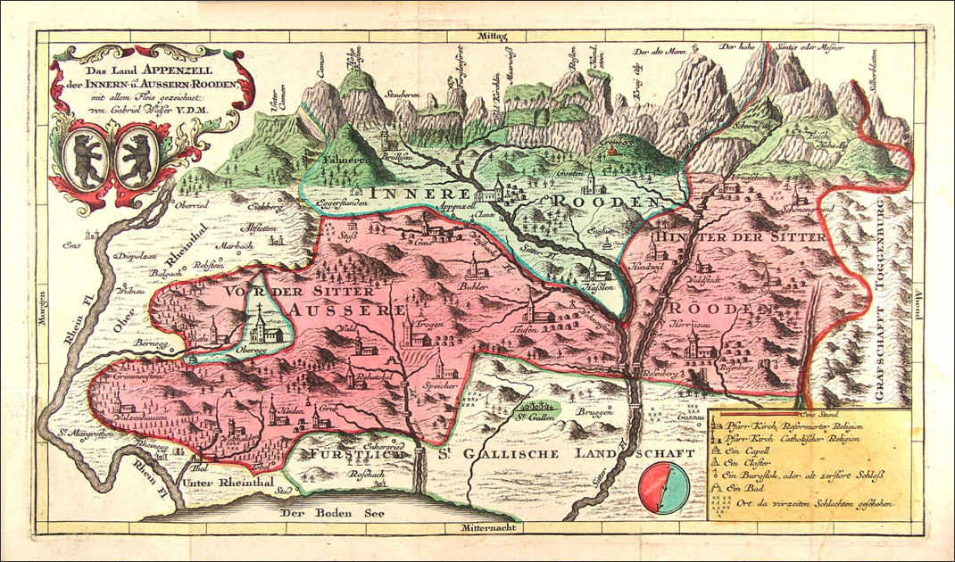 Karte des Kantons Appenzell von Gabriel Walser aus der Neuen Appenzeller Chronik 1740.